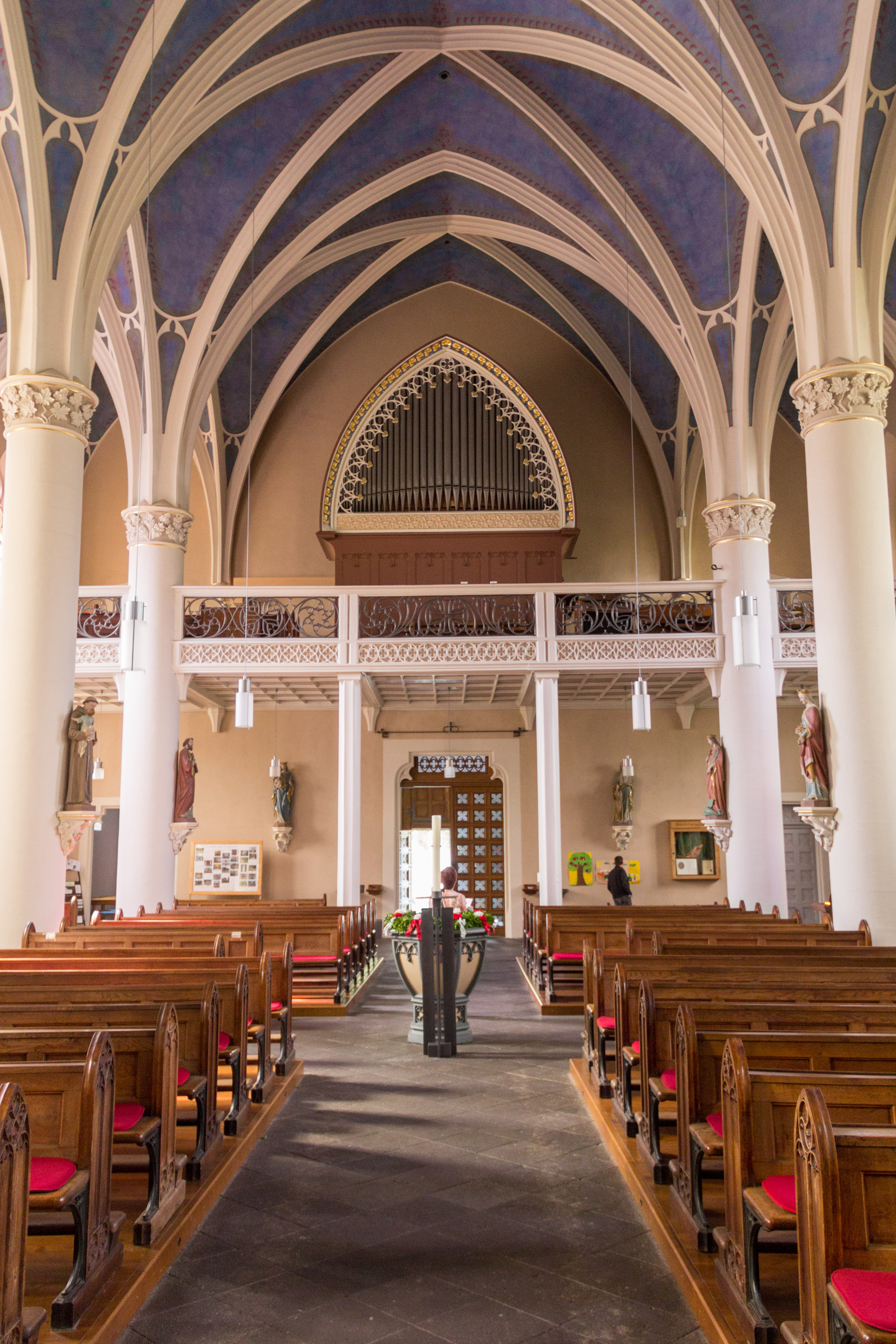 Treis-Karden, Katholische Pfarrkirche St. Johann Baptist